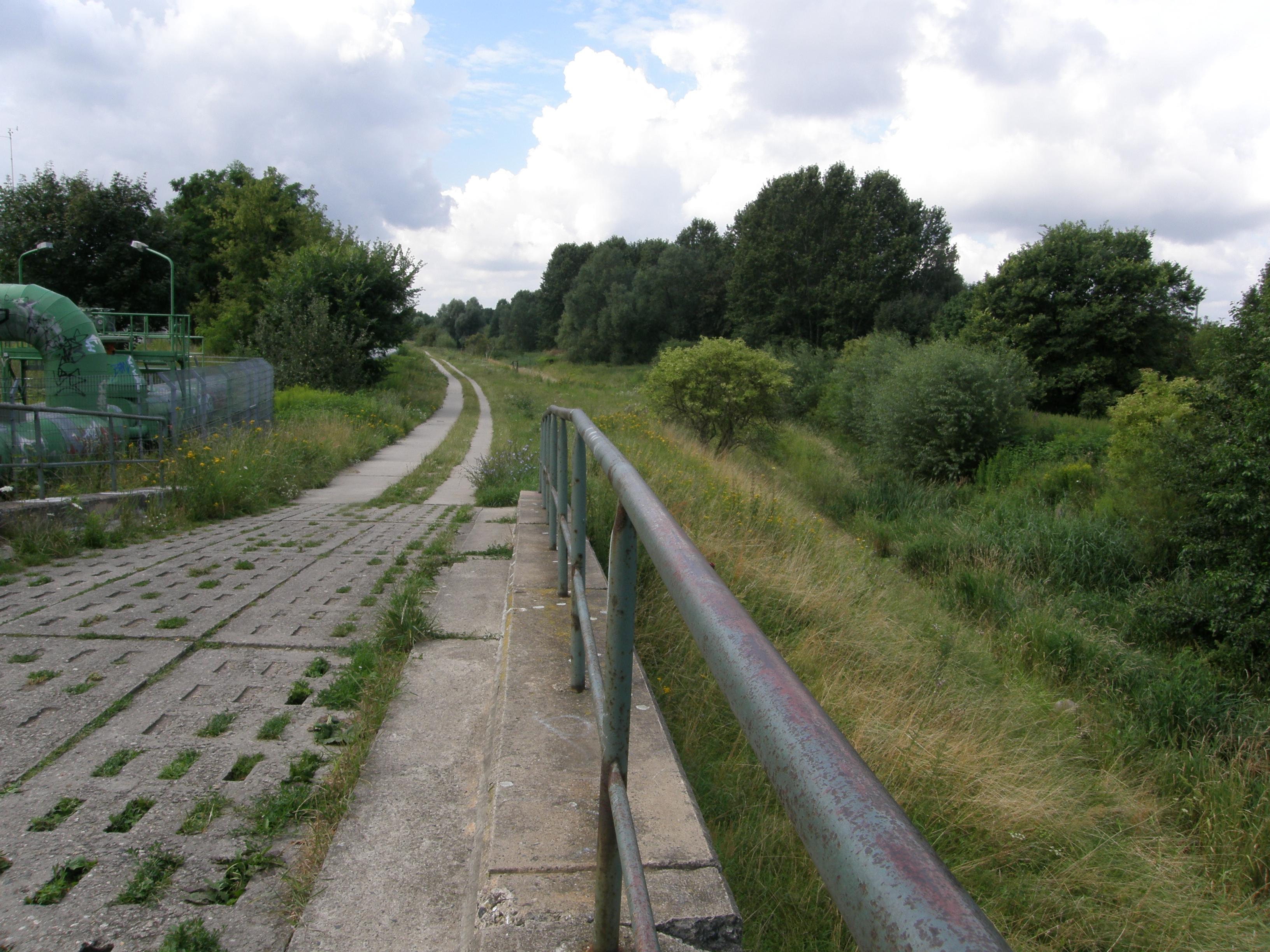 Hellersdorf, Wuhle-Wander- und Radweg in Höhe der Zossener Straße